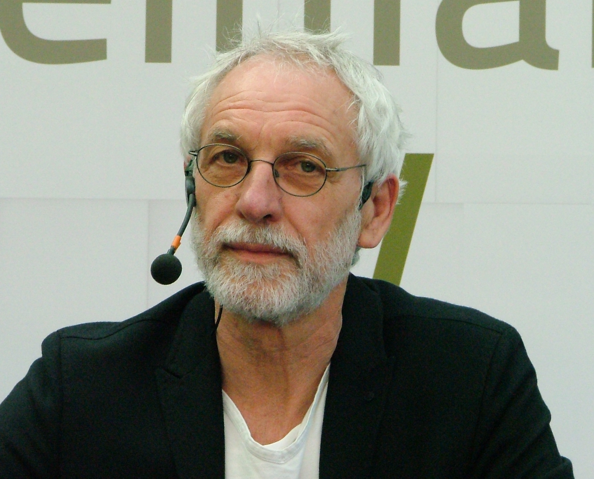 Roman Kempf, Lesung bei der Buchmesse Rheinland-Pfalz am 23. April 2016